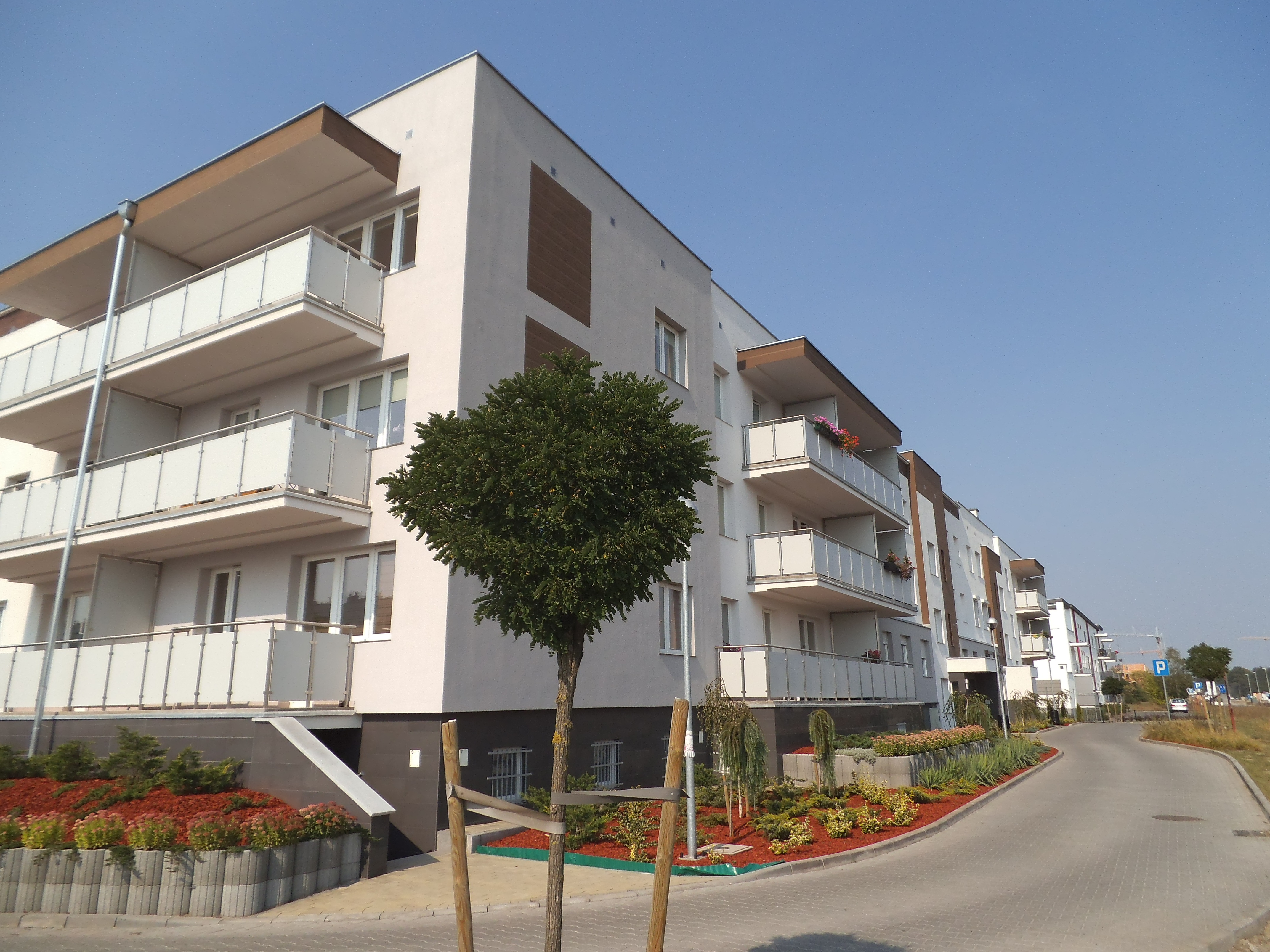 Fragment zabudowy wielorodzinnej przy ulicy Watzenrodego w Toruniu